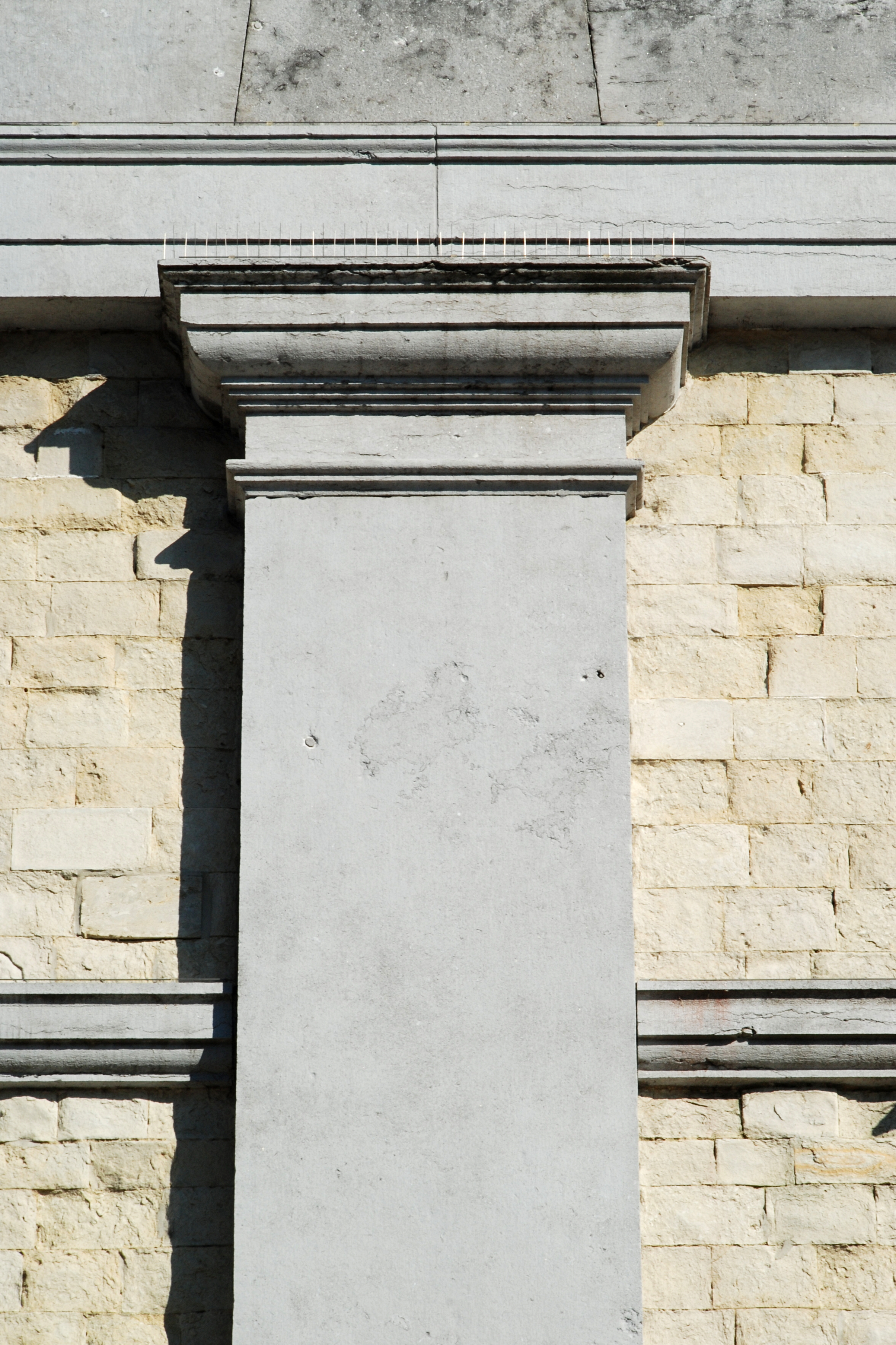 Belgique - Brabant wallon - Église Saint-Jean l'Évangéliste de Genappe